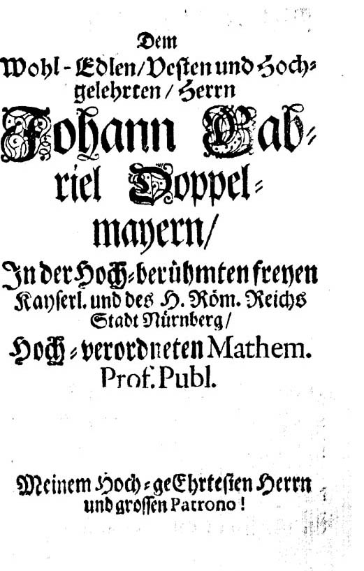 Scriptura S. Copernizans seu potius Astronomia Copernico-scripturaria bipartita = das ist: Ein gantz neu-und sehr curioser astronomischer Beweissthum des Copernicanischen Welt-Genaudes aus H. Schrifft ... von Joahnn Jacob Zimmermann philo-mathematico. - [Bayreuth?] : [s.n.], [post 1709?]. - [12], 105, [13] p., [3] c. di tav. : ill. ; 8º. - Data di pubblicazione dalla lettera di dedica. .